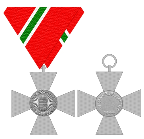 Grafische Darstellung des Landesverteidigungskreuzes Ungarn 1944